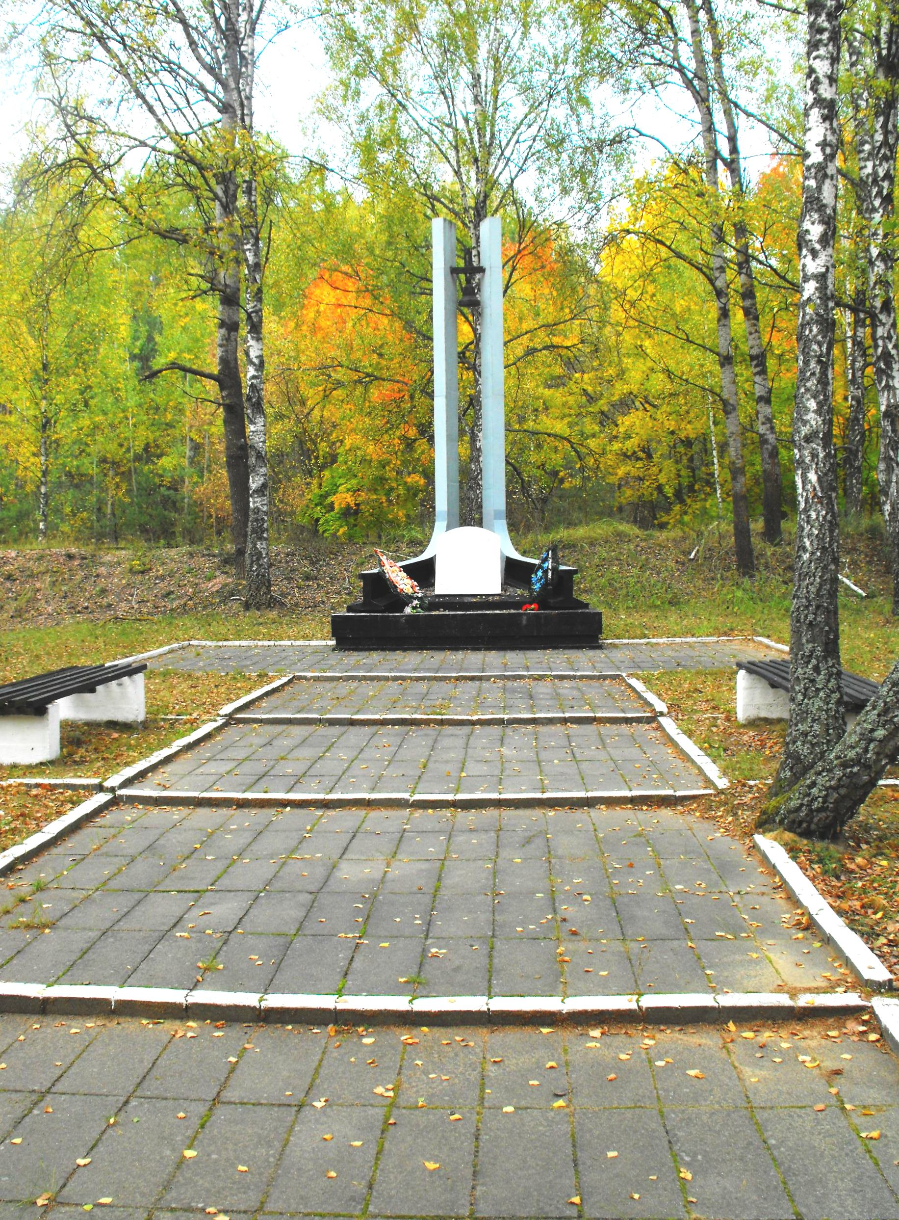 Бронная Гора. Памятник более 50 000 евреям, убитым в этом месте во времена Холокоста.